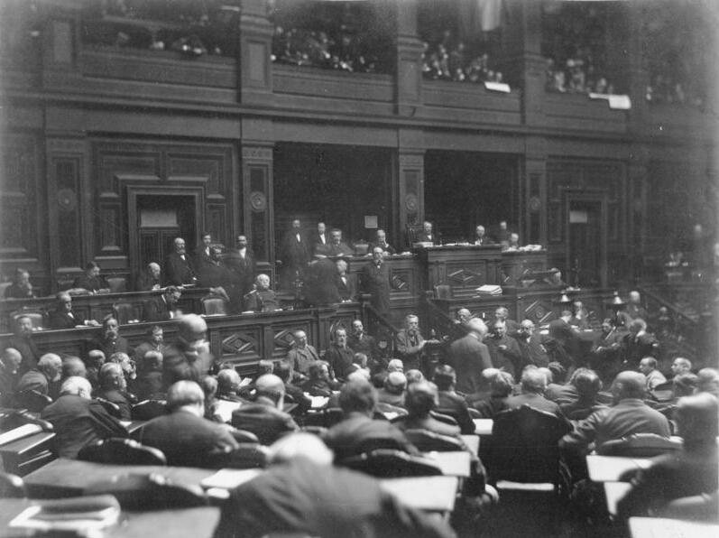 Plenarsitzungssaal - rechte Seite.